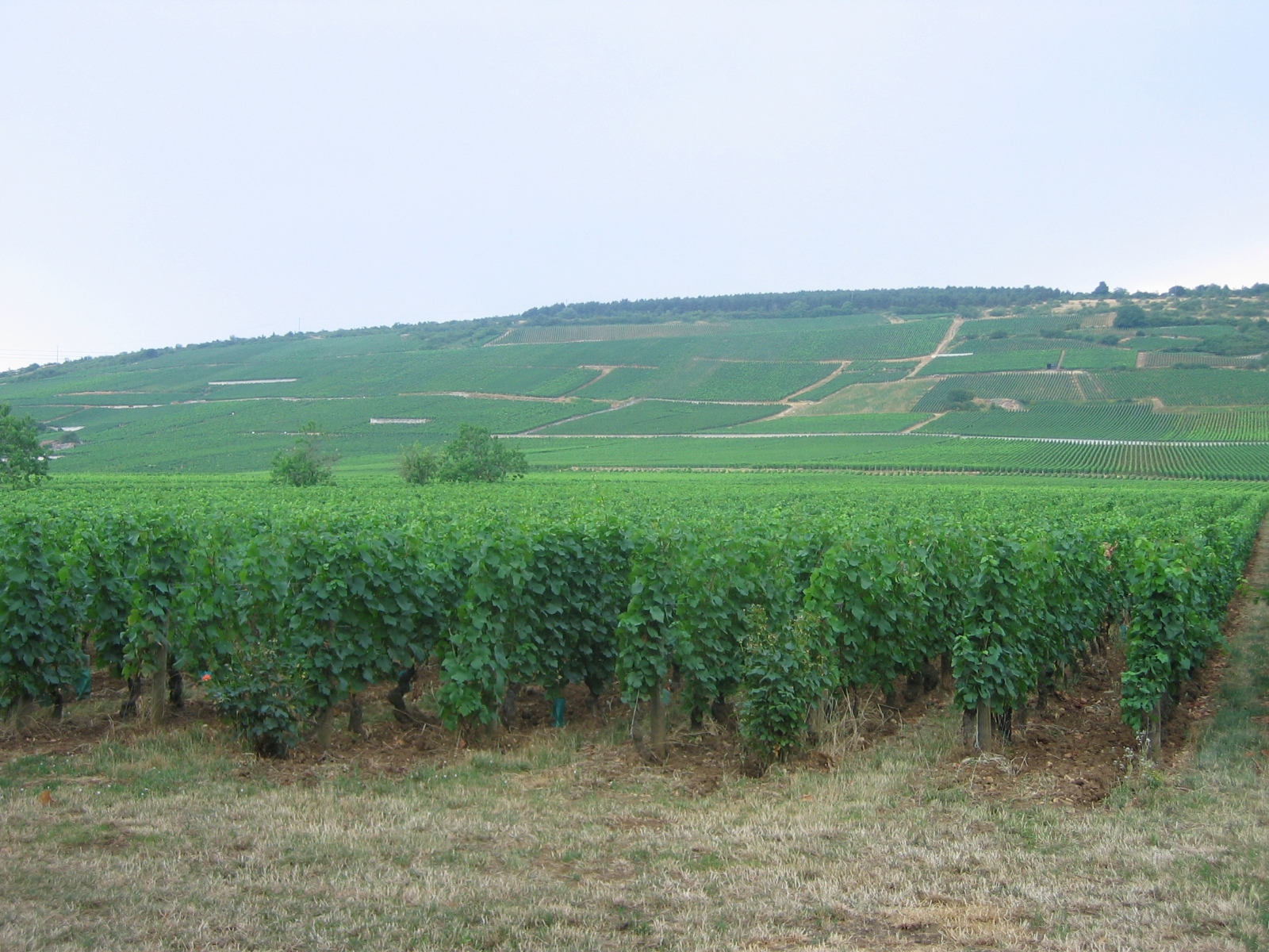 Vignoble de Vosne-Romanée, Bourgogne, France.